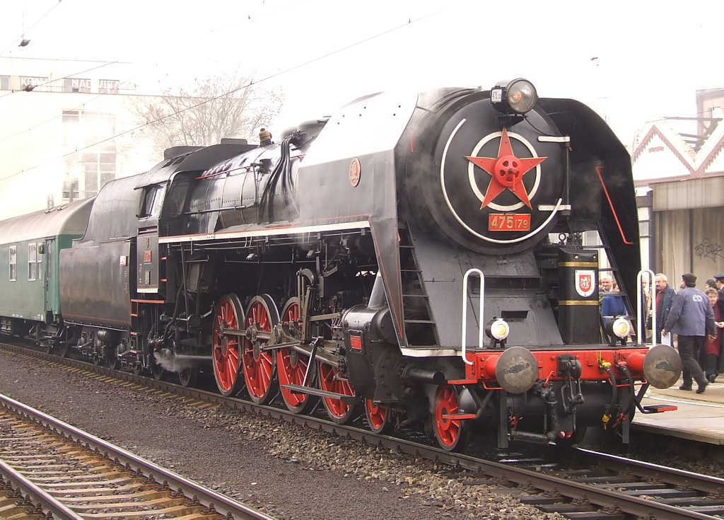 Lok 475.179 mit einem Sonderzug aus Dresden nach Prag beim Wasserhalt in Kralupy.